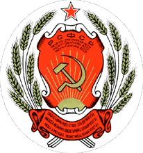 Нохчийн: Герб Чечено-Ингушской АССР